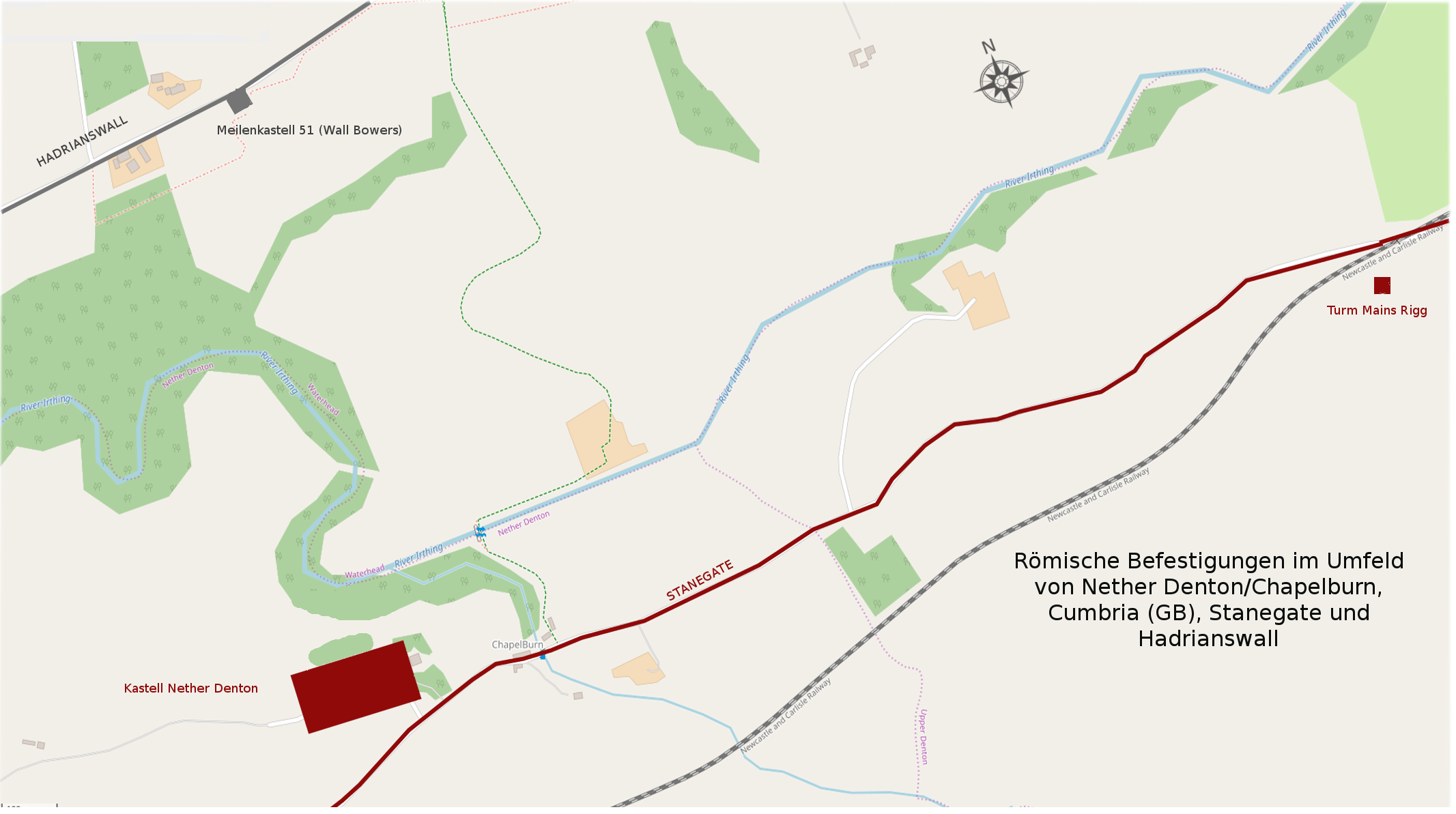 Römische Befestigungen im Umfeld von Nether Denton/Chapelburn, Cumbria (GB), Stanegate und Hadrianswall.